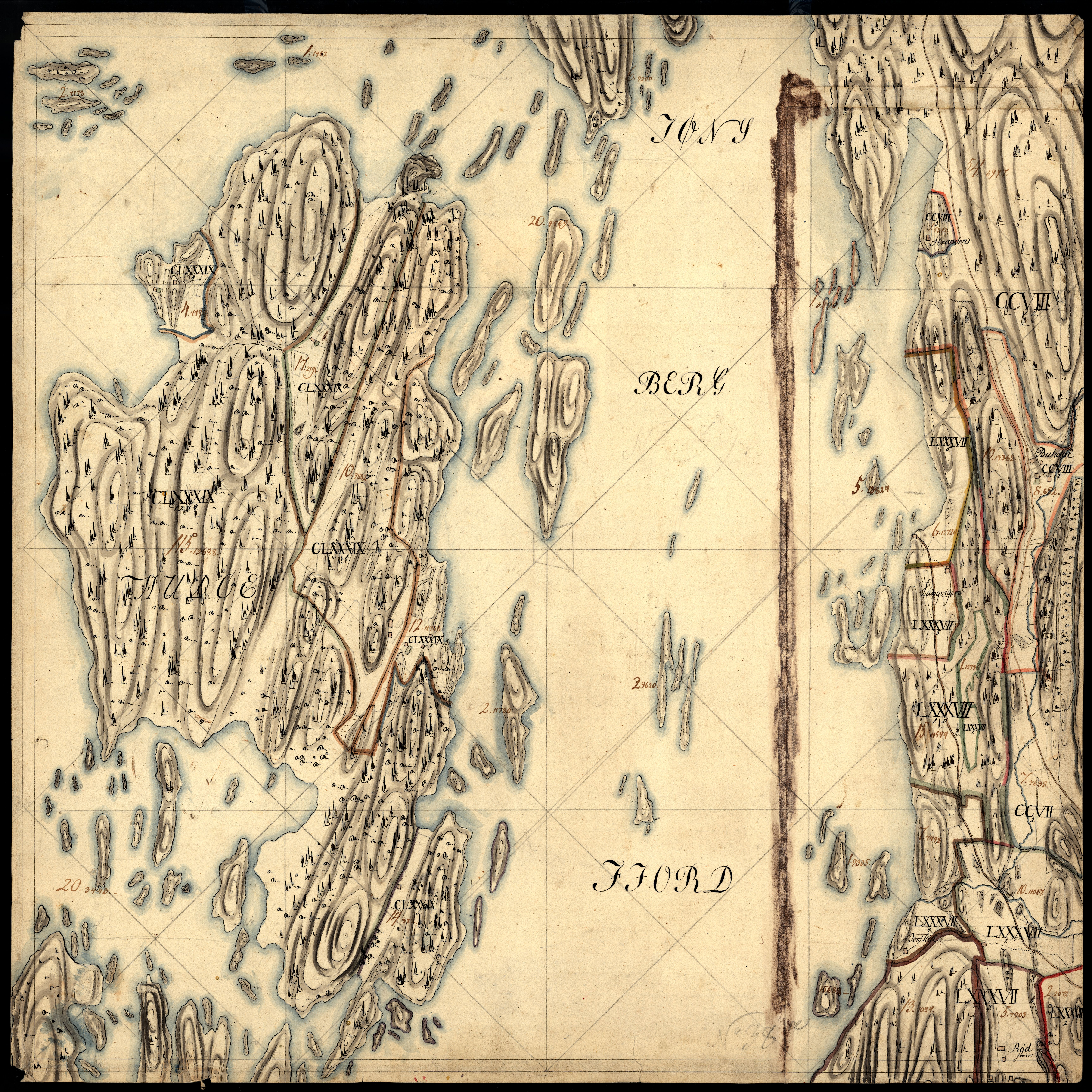 Hui (Hudø), Bekkevika m.m. i Tjøme kommune.